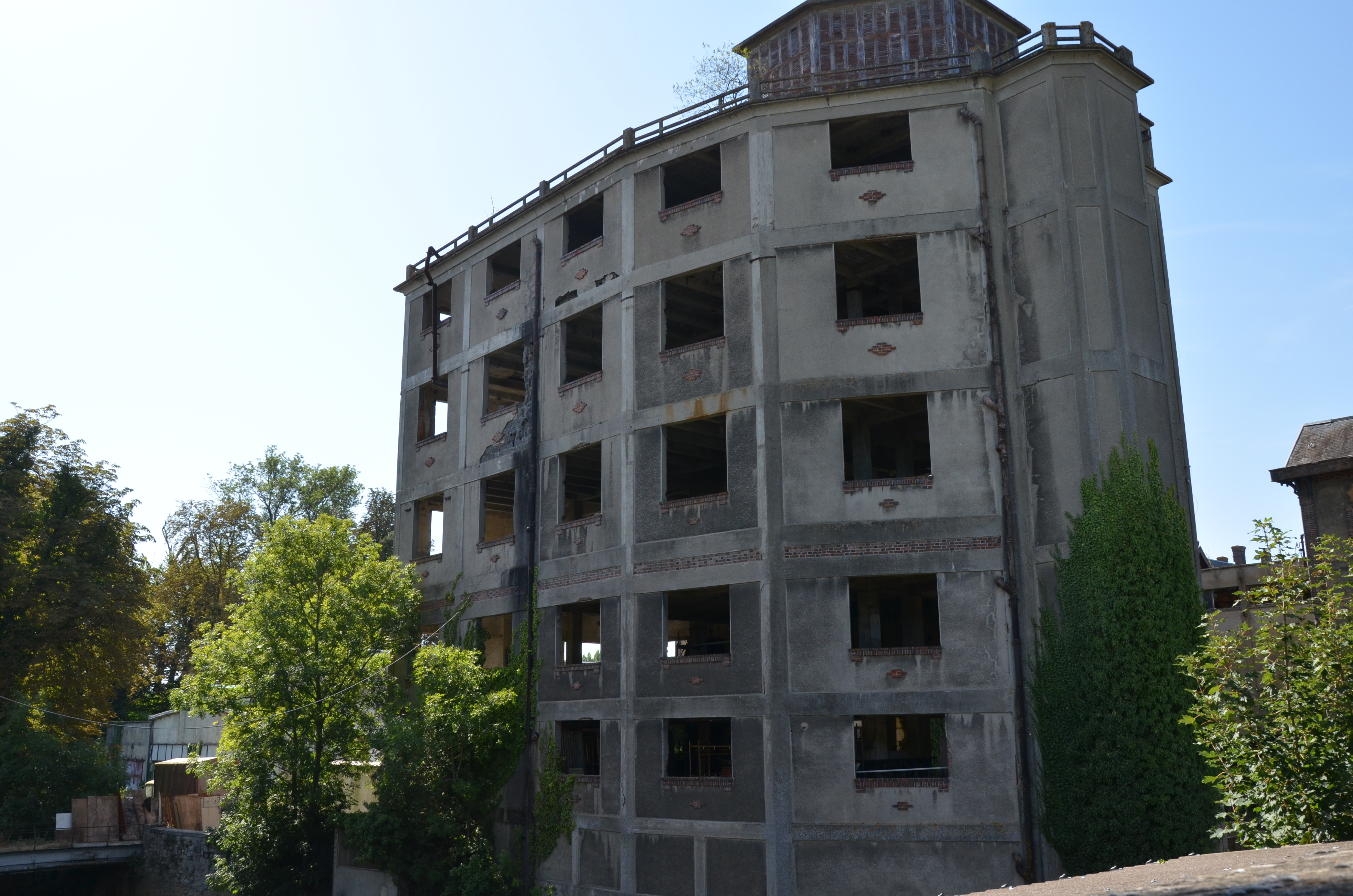 Atelier de fabrication plus récent.